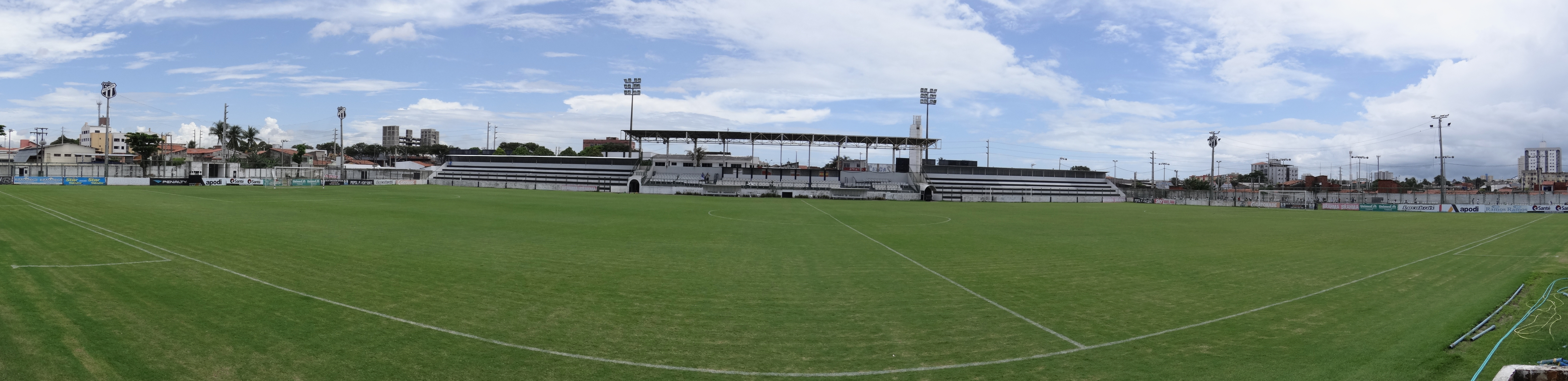 Foto panorâmica do estádio Carlos de Alencar Pinto, mais conhecido com Vovozão.